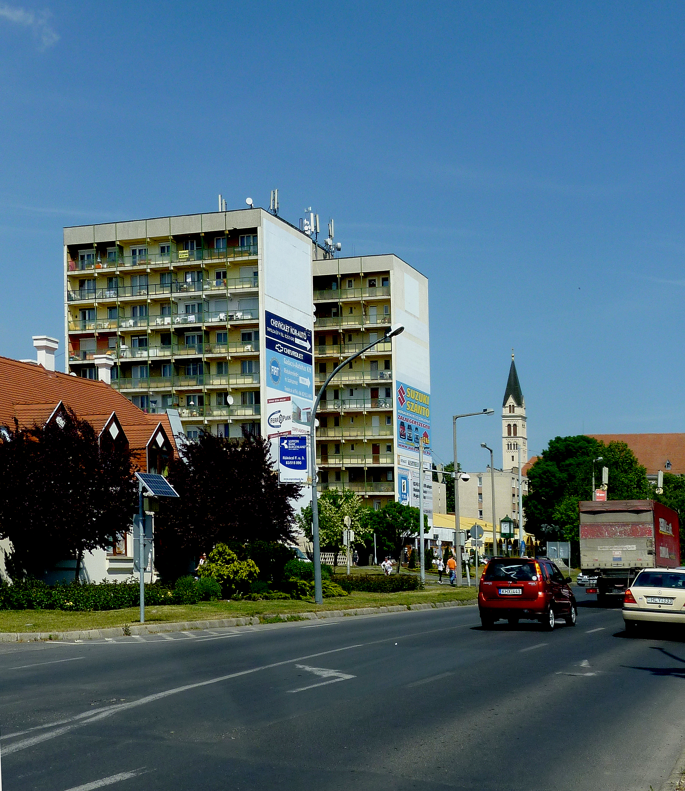 Keszthelyi vásártér és lakóépület, épült 1968-ban